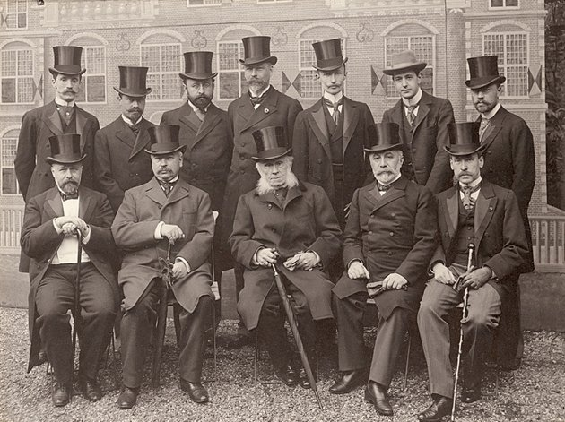 The Russian delegation at the Hague Peace Conference, 1899; sitting second from left: Friedrich Martens (1845-1909), renowned Russian expert in international law Российская делегация на Гаагской конференции. Сидят: граф Баранцев, Ф. Ф. Мартенс, Е. Е. Стааль, А. К. Базили, А. Г. Рафалович, Я. Г. Жилинский; Стоят: Н. А. Гурко-Ромейко, И. А. Овчинников, В. М. Гессен, С. П. Шеин, М. Ф. Шиллинг, Н. А. Базили, М. Г. Приклонский